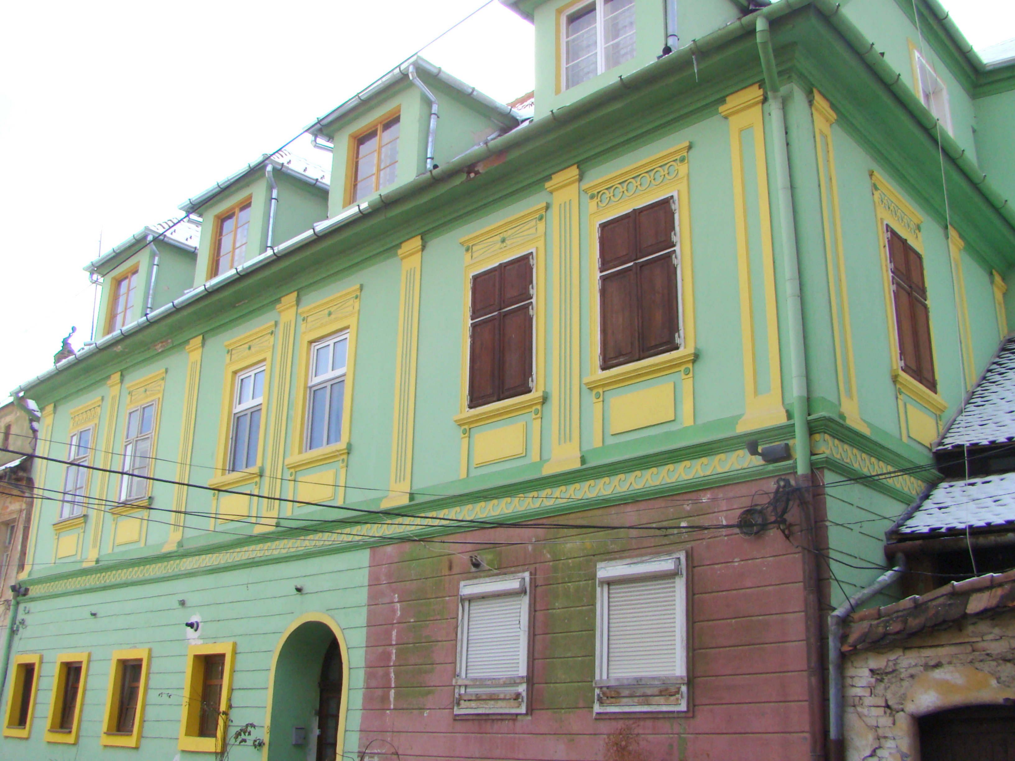 Casa Heinz, municipiul Sighișoara, Piața Oberth Hermann 3 1650 - 1700, 1701 - 1711, 1800 - 1825